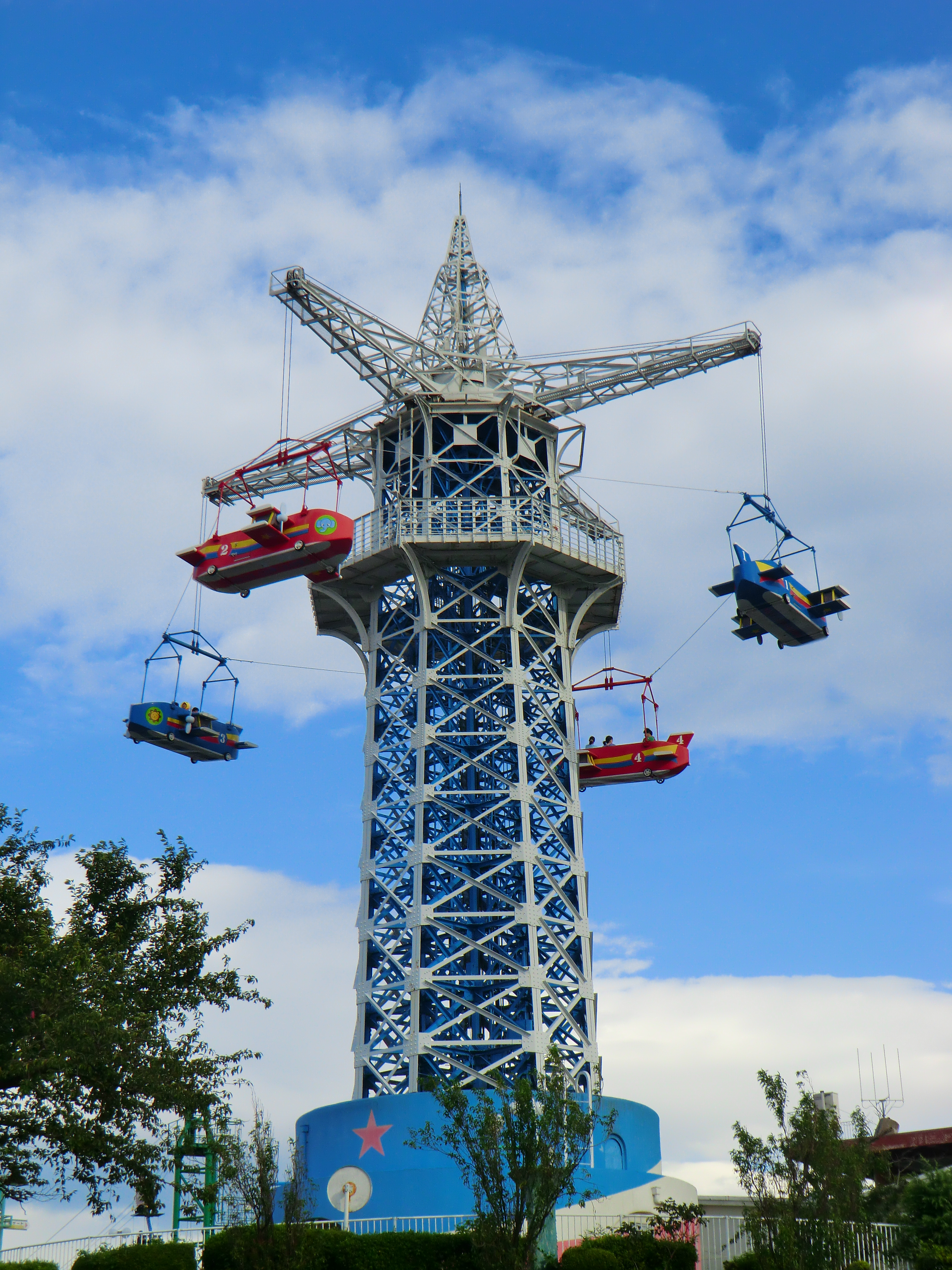 生駒山上遊園地の飛行塔